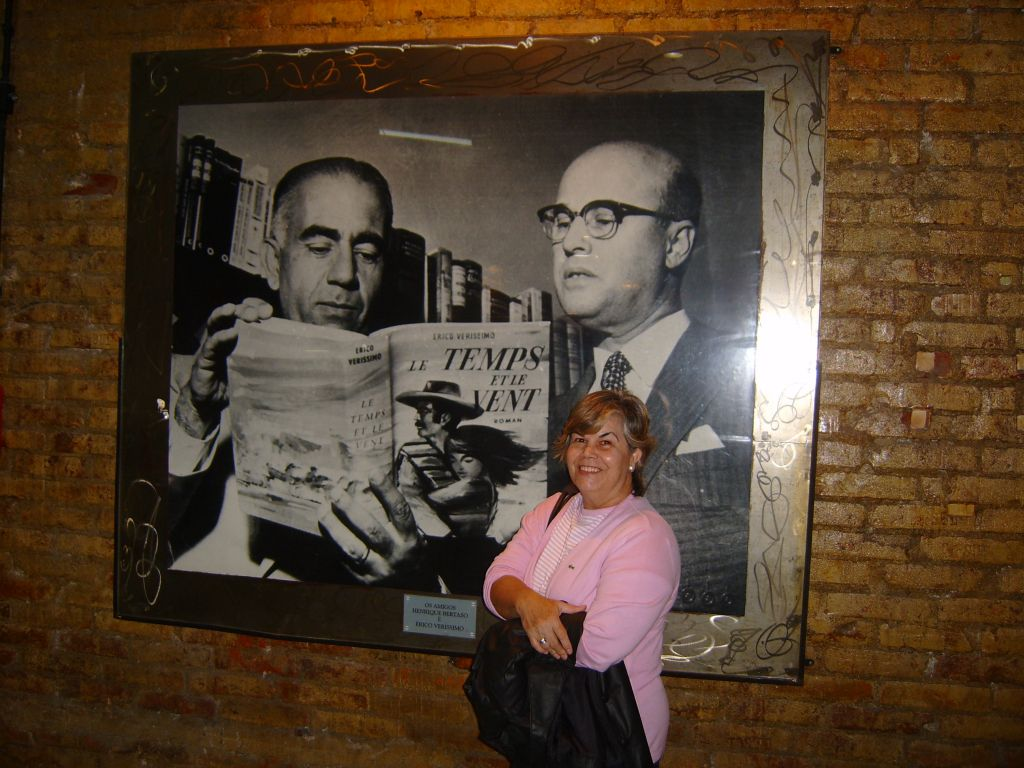 Quadro de Érico Veríssimo, mostrando-o com a trilogia "O Tempo e o Vento" em francês, ao lado do amigo Henrique Bertaso. Livraria do Globo, em Porto Alegre, Brasil. Setembro de 2006, trabalho próprio